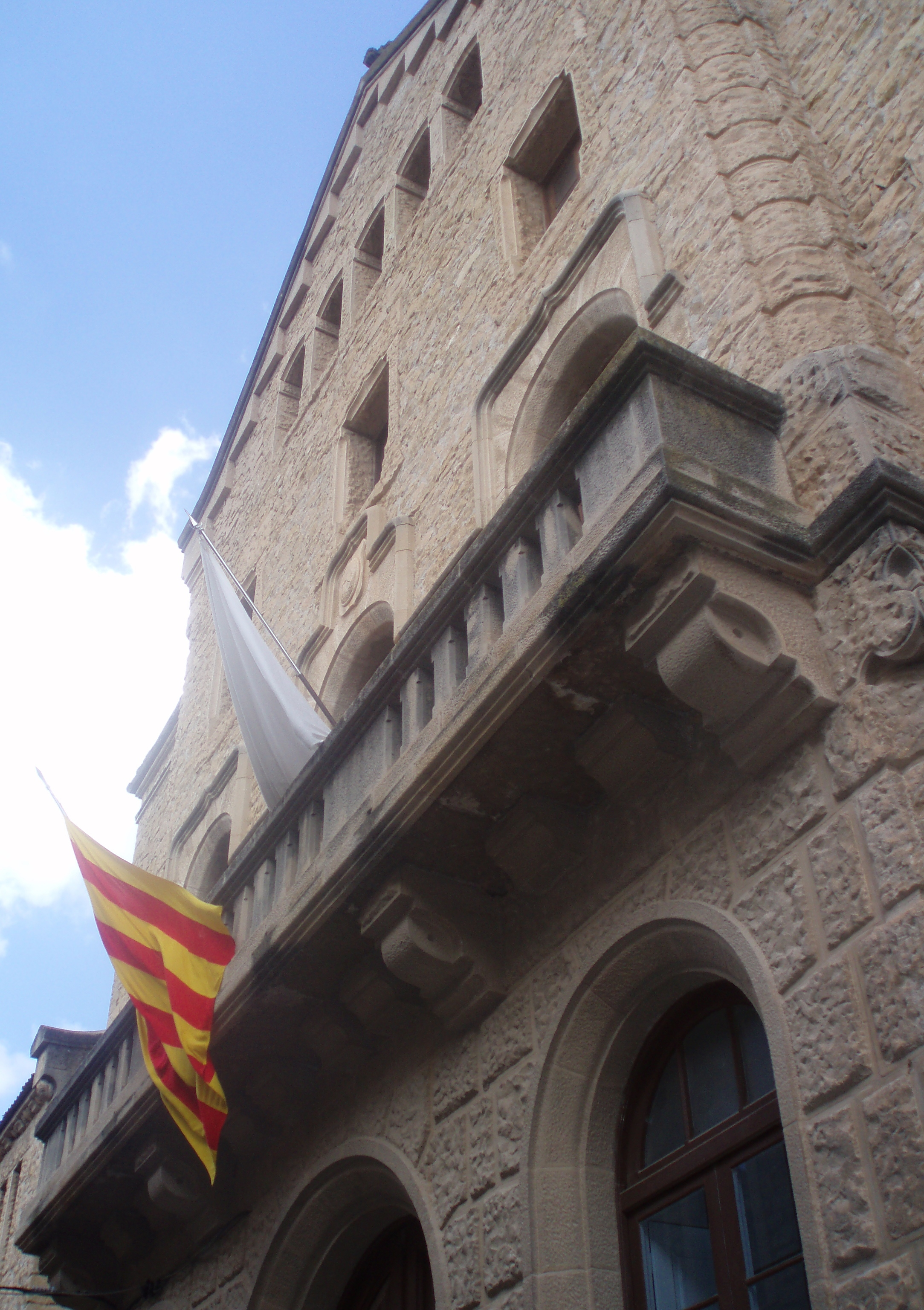 Façana principal de l'Ajuntament de Cervià de les Garrigues